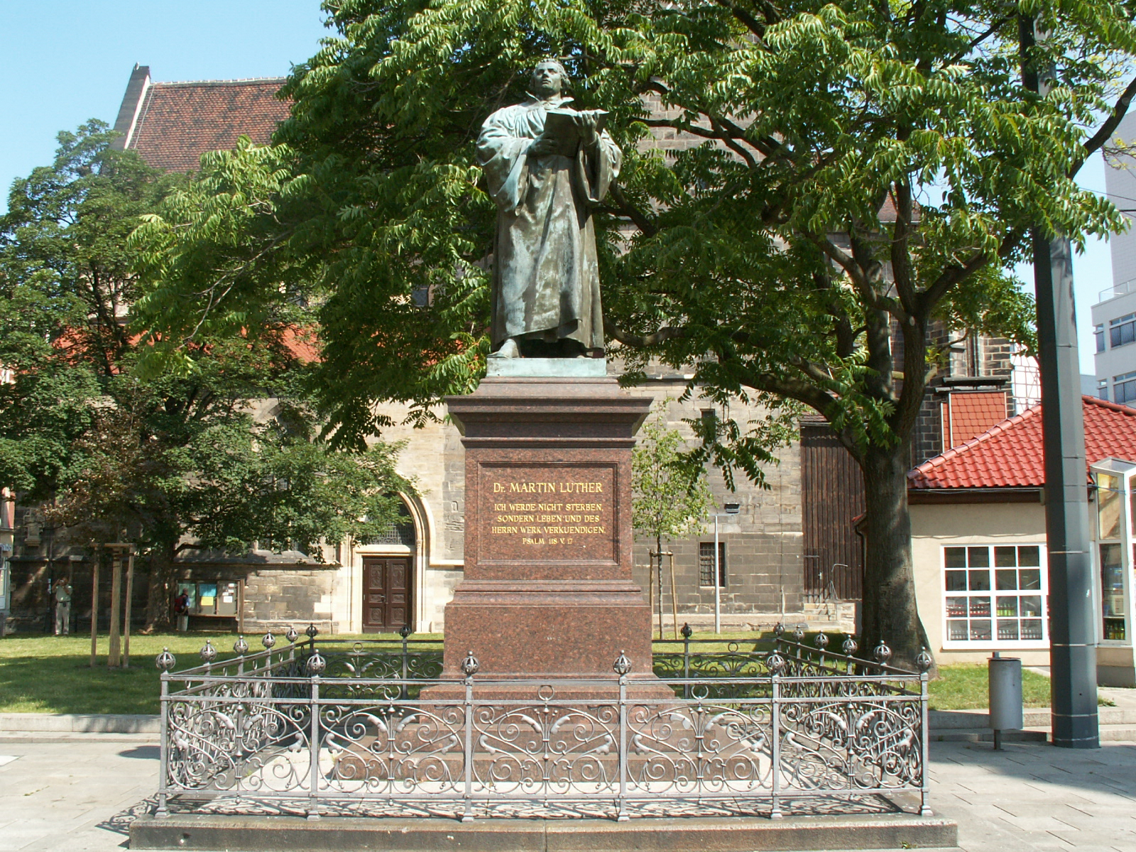 Martin-Luther-Denkmal (errichtet zwischen 1889 und 1890) am östlichen Anger in Erfurt, im Hintergrund: Kaufmannskirche